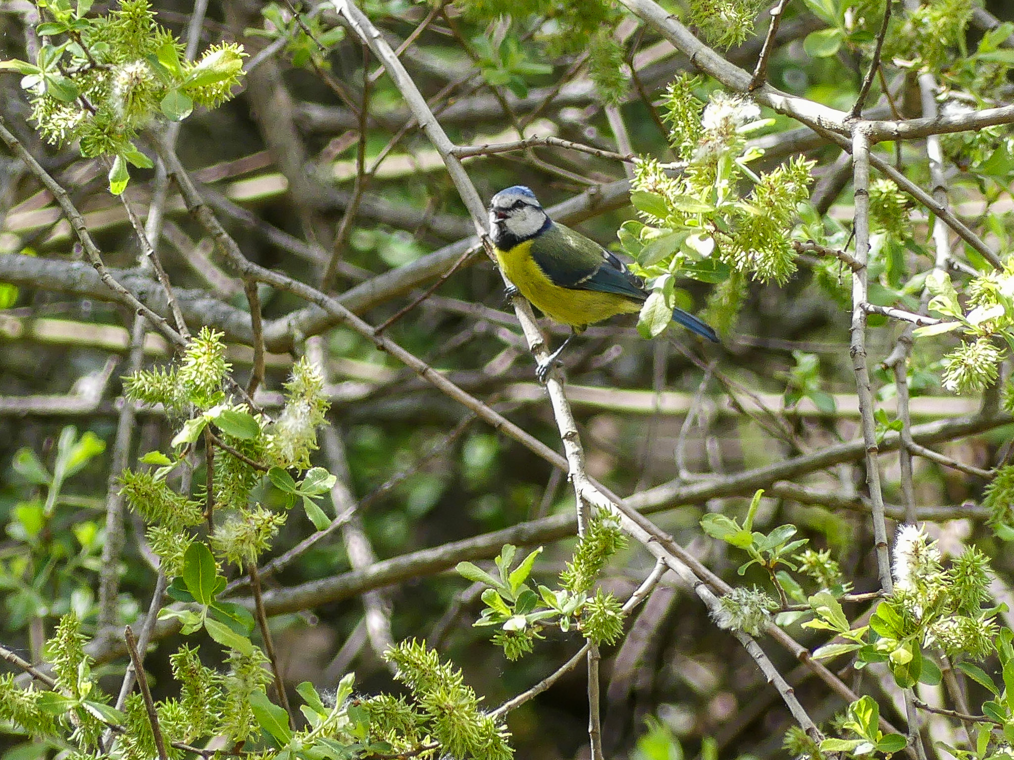 ogliastrae subspecies